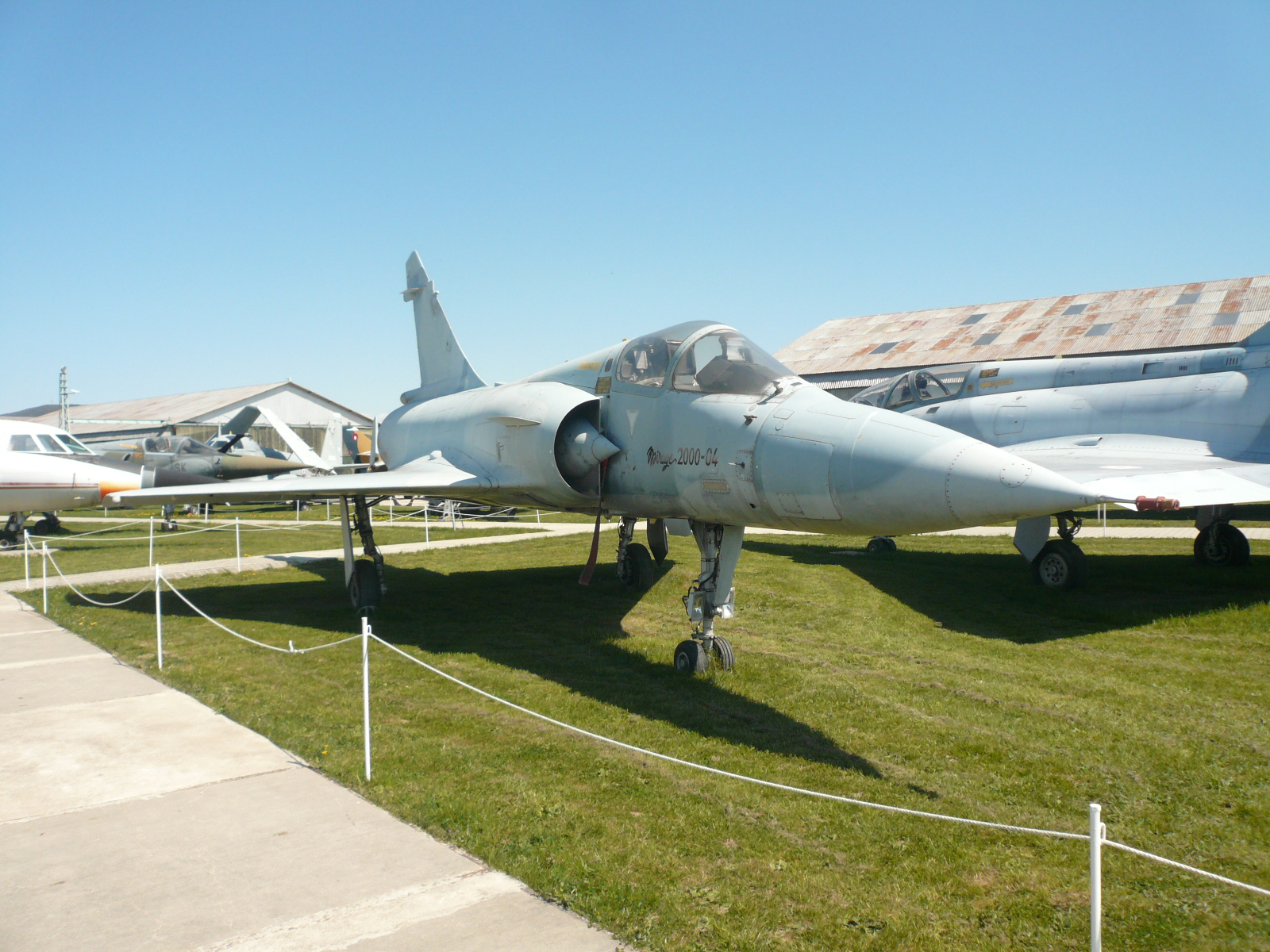 Mirage 2000C MEAC